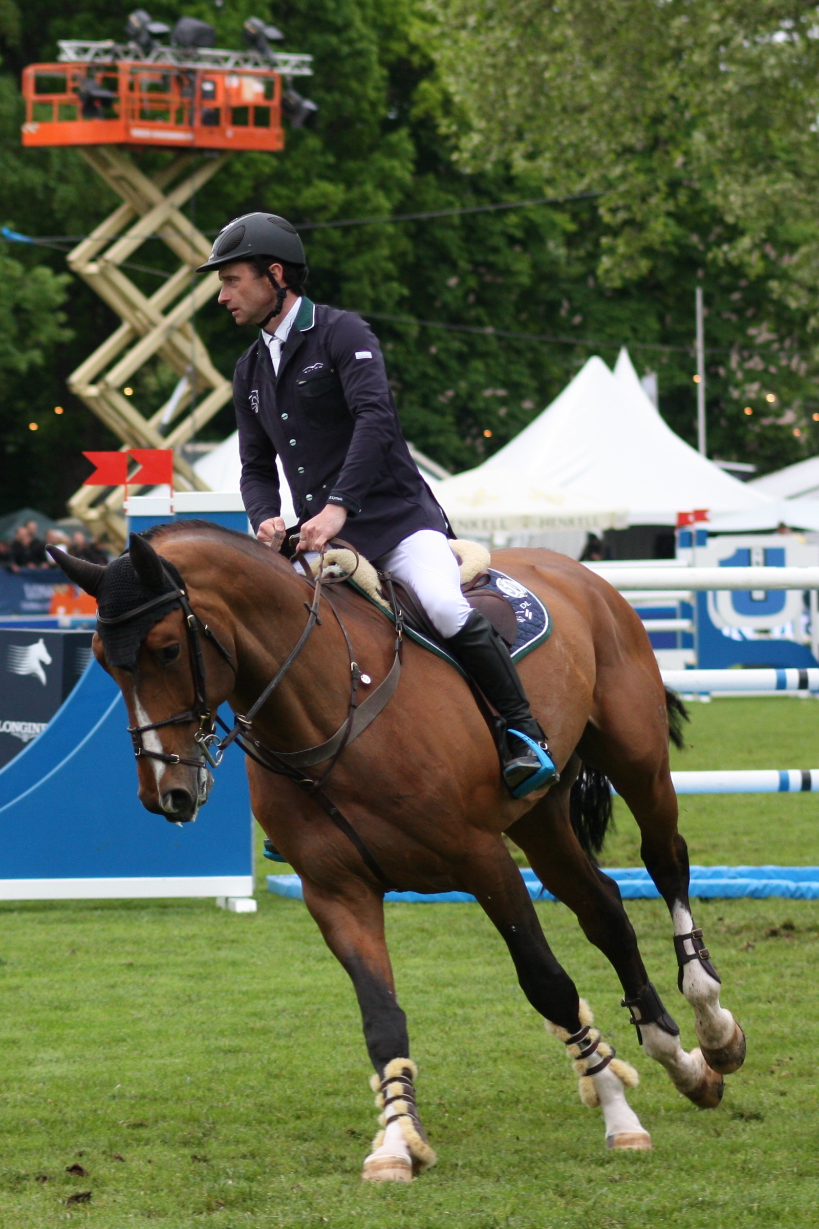 77. Internationanles Wiesbadener Pfingstunier 2013, CSI***** Eröffnungsspringen, Denis Lynch auf All Star Personality rights warning Although this work is freely licensed or in the public domain, the person(s) shown may have rights that legally restrict certain re-uses unless those depicted consent to such uses. In these cases, a model release or other evidence of consent could protect you from infringement claims.